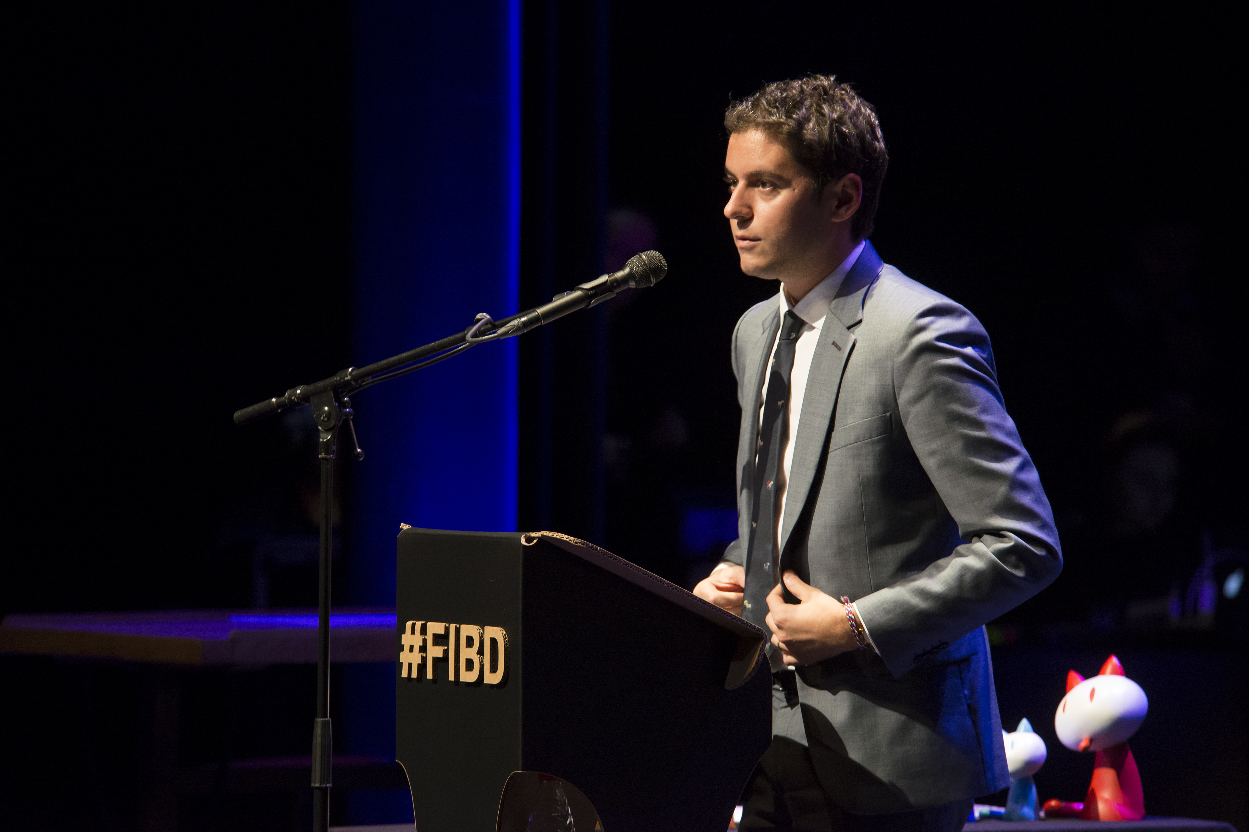 Gabriel Attal, secrétaire d'État auprès du ministre de l'Éducation nationale, à la cérémonie de remise des prix Découvertes du Festival International de la Bande Dessinée d'Angoulême le jeudi 24 janvier 2019.